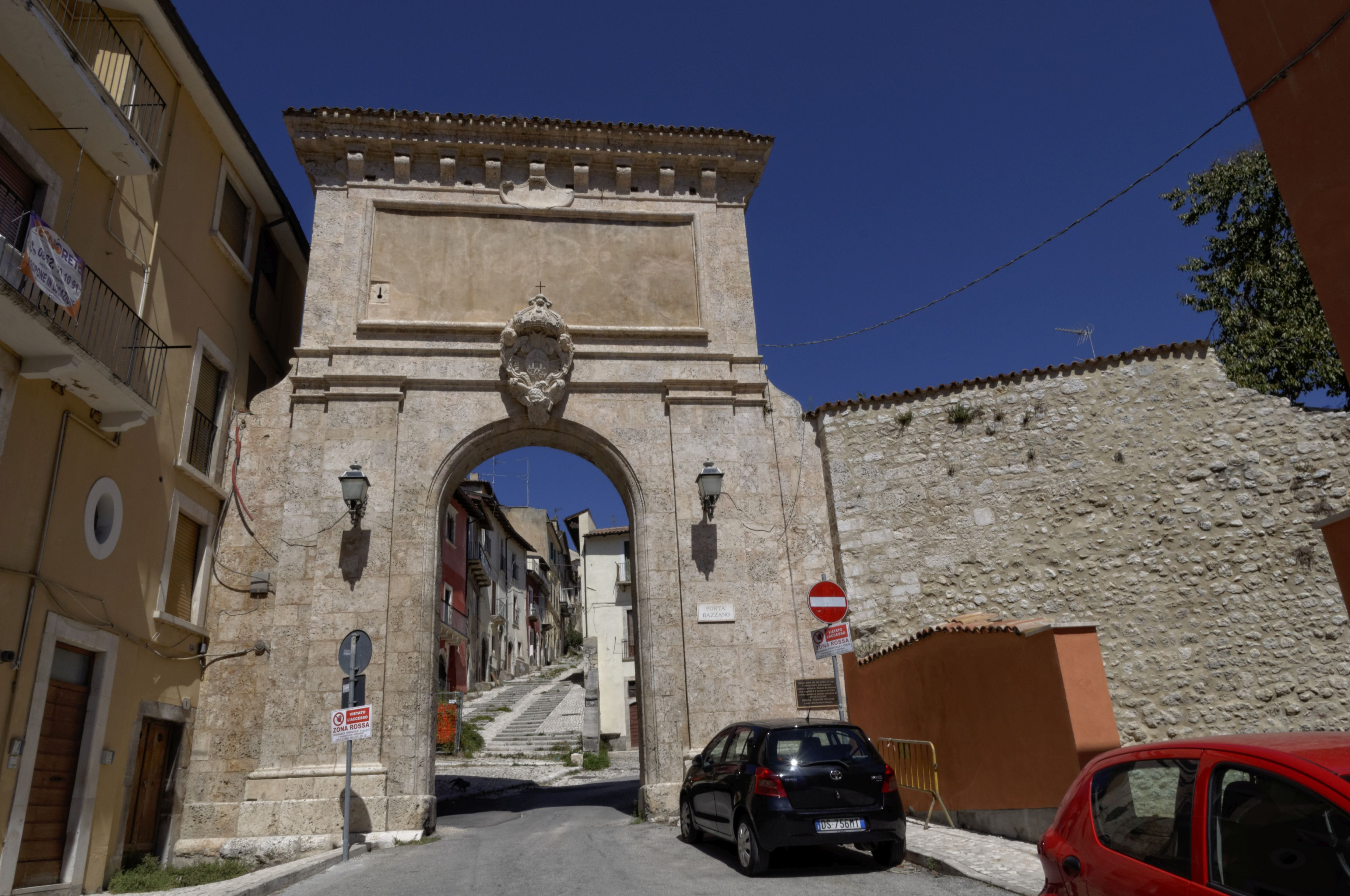 L'Aquila 2017 Dieses Foto entstand in Zusammenarbeit mit Stadtbesichtigungen.de Die Seiten Stadtbesichtigungen.de, der dazugehörige Reise Blog sowie die Facebookseite: Stadtbesichtigungen Rom dürfen dieses Bild für Ihre Veröffentlichungen ohne den Hinweis auf Wikipedia, Commons bzw der Lizenz verwenden. Die Verantwortlichen habe von mir (Ra Boe) die Originaldaten zur freien Verfügung übermittelt bekommen.